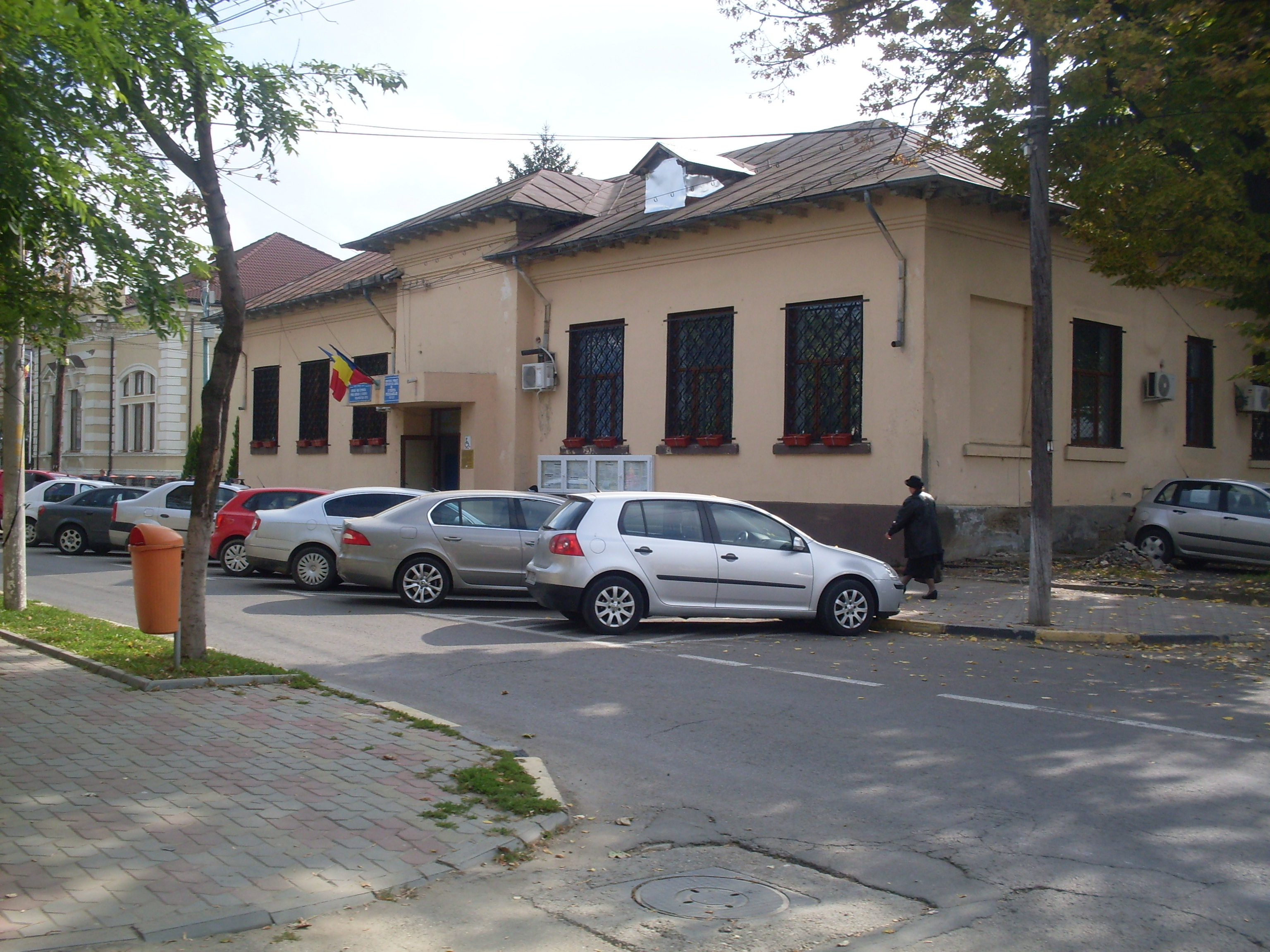 Casa Strada Elena Doamna Nr 1-3